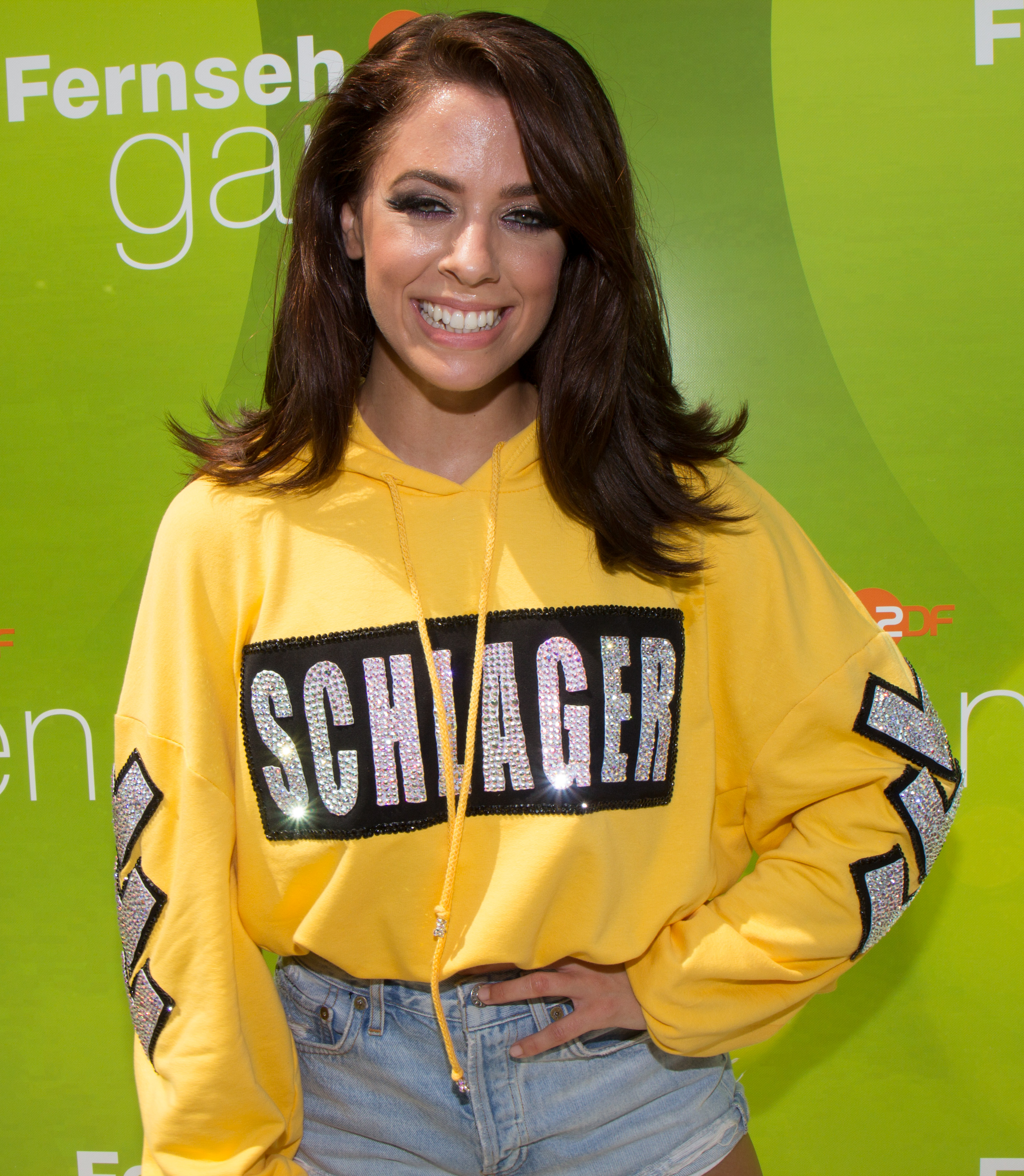 Vanessa Mai als Gast beim ZDF-Fernsehgarten am 10. Juni 2018 in Mainz.